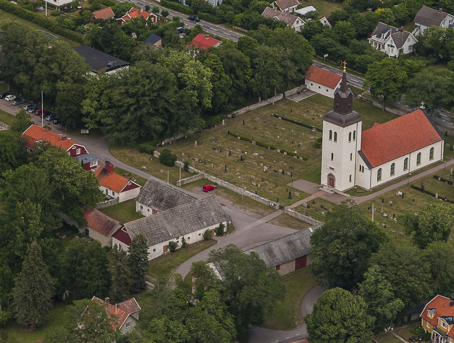 Kastlösa ka